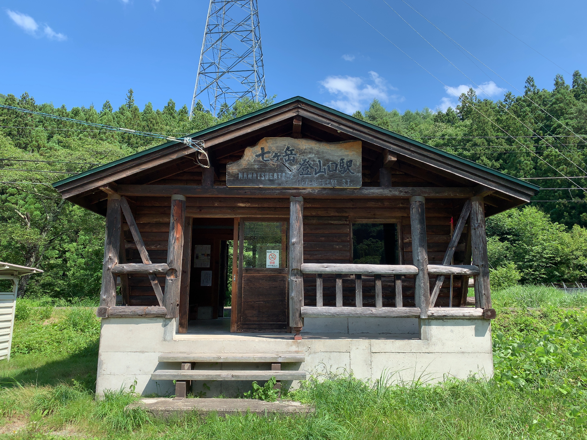 会津鉄道 七ヶ岳登山口駅 駅舎